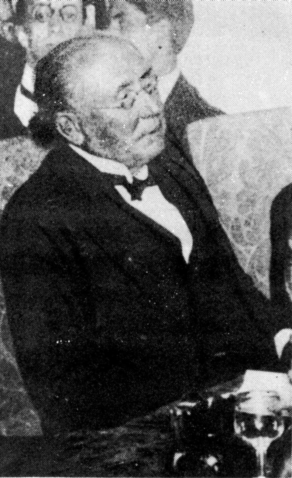 Almafuerte pronunciando una conferencia en 1913